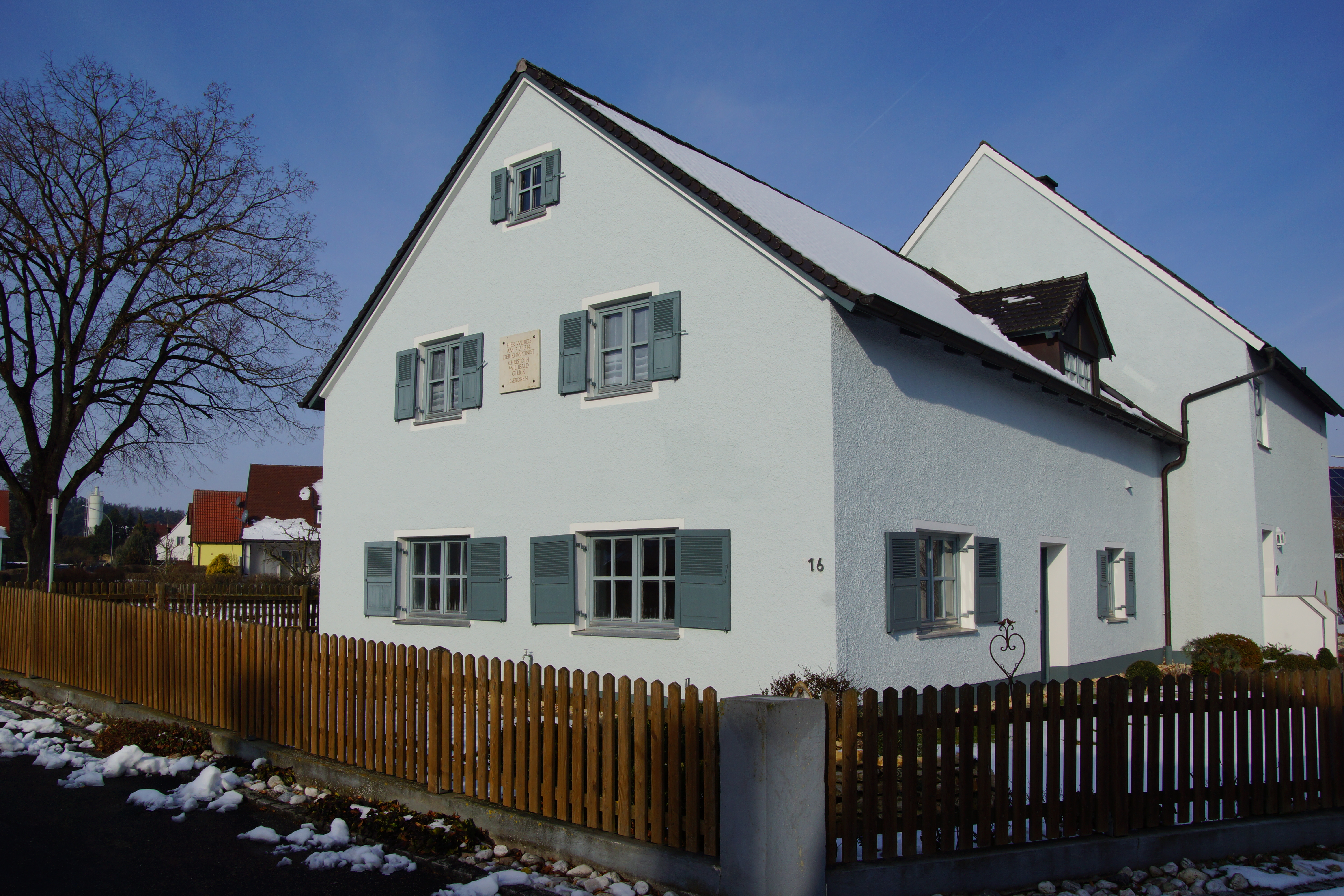 Das Geburtshaus des Komponisten Christoph Willibald Gluck in Erasbach bei Berching in der Oberpfalz